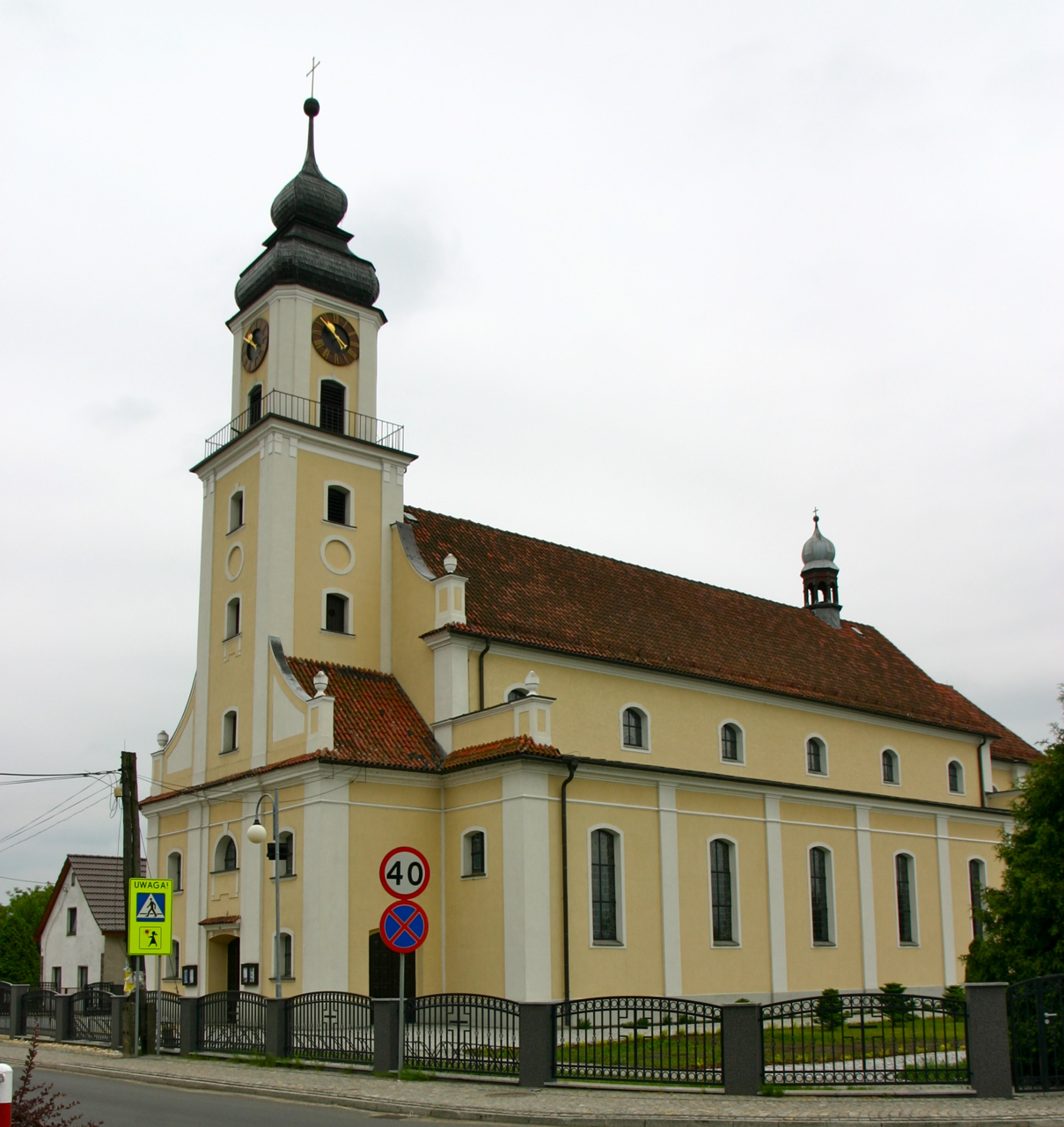 Chróścice - kościół parafialny pw. św. Jadwigi, 1936-1937